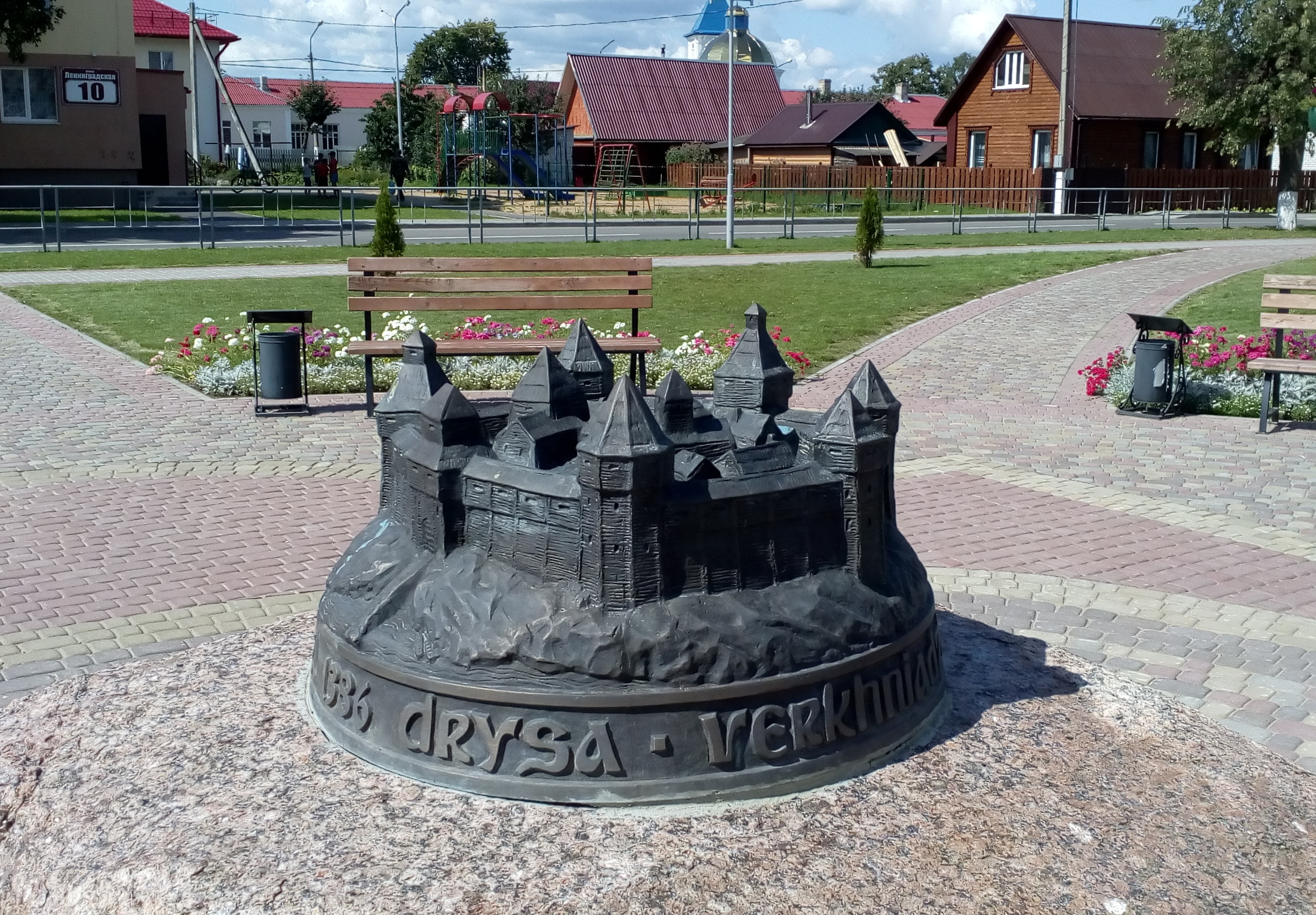 Макет Дрысенскага замка на галоўнай плошчы ў Верхнядзвінску